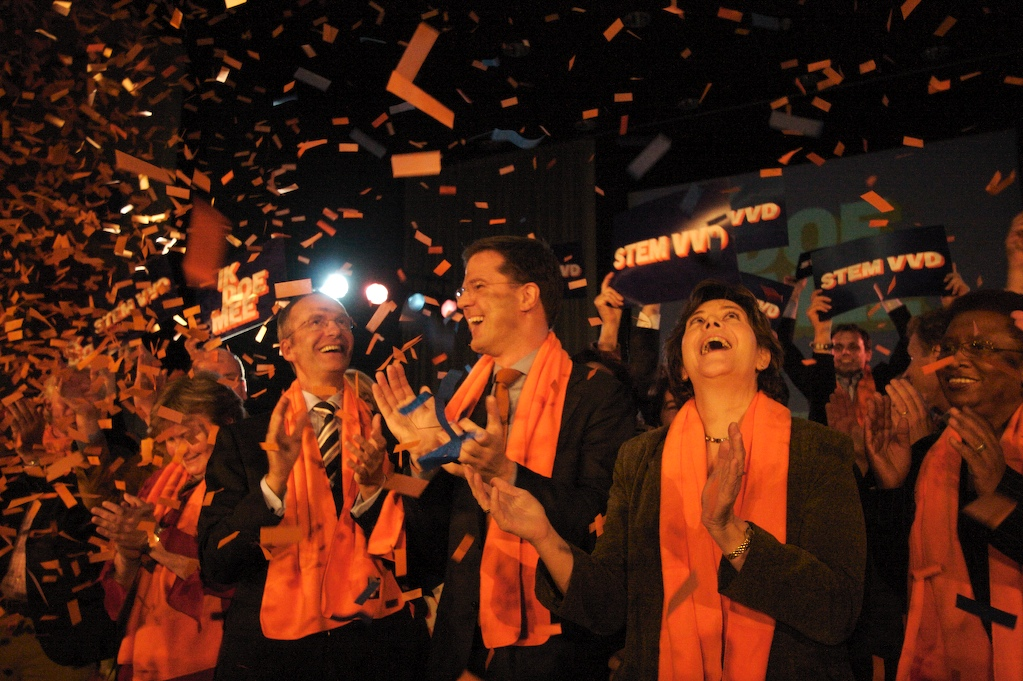 Mark Rutte, Rita Verdonk en Henk Kamp staan op het podium tijdens het kick-off evenement voor de campagne van de tweede kamer verkiezingen in 2006. Opdrachtgever: VVD